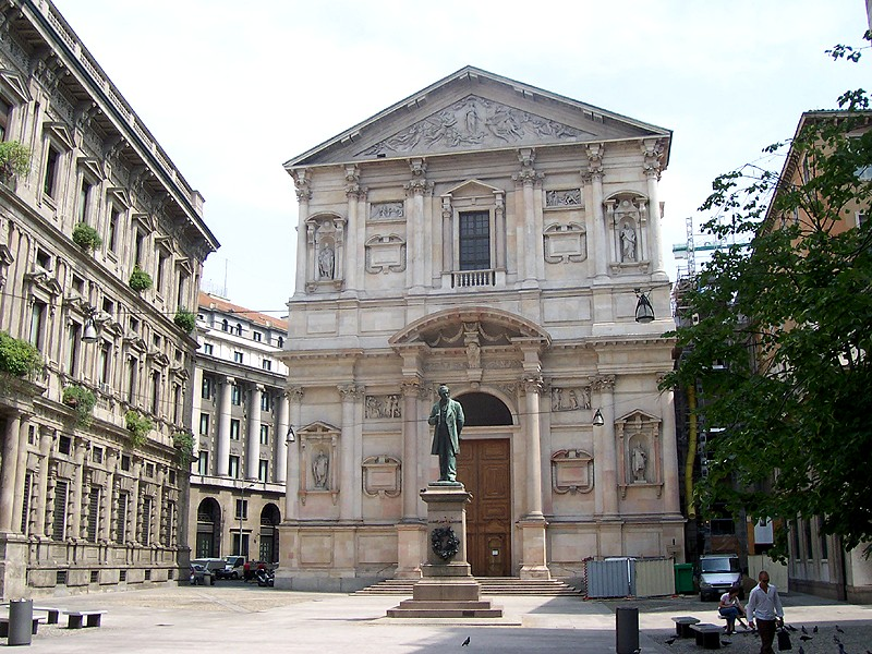 Milano - Chiesa di S. Fedele